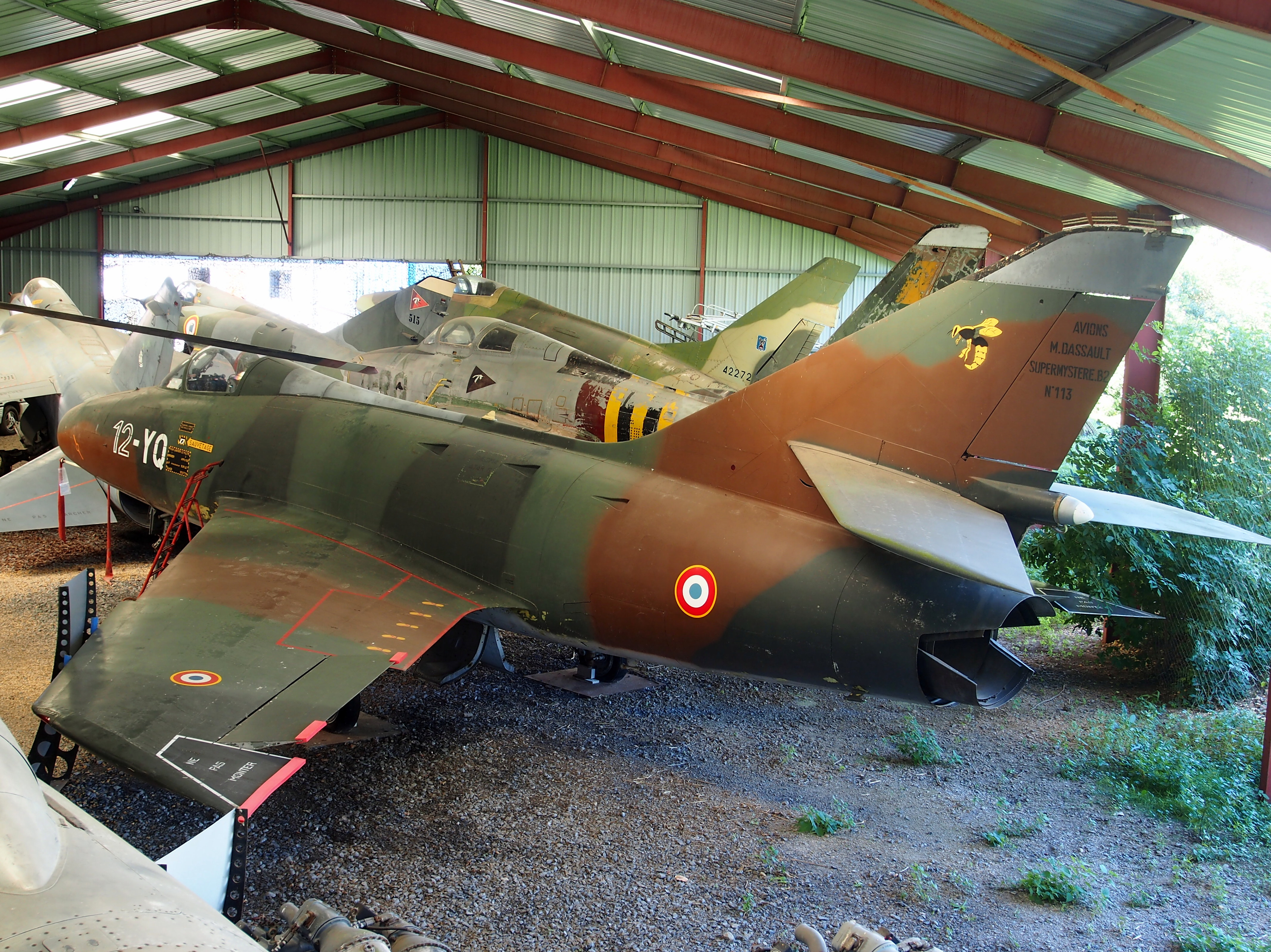 Photographed at the Musée de l'Epopée de l'Industrie et de l'Aéronautique, Albert, France.